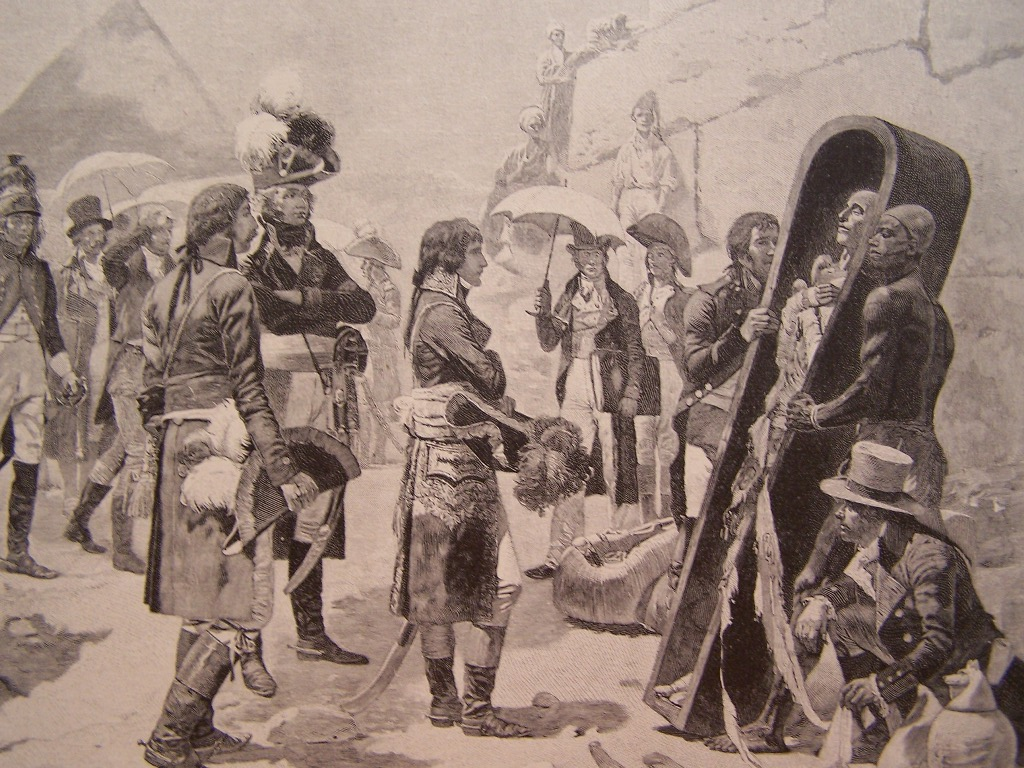 Fragment "Bonaparte in Ägypten"